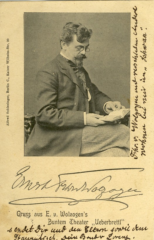 Gruß aus E. v. Wolzogen's Buntem Theater „Ueberbrettl“